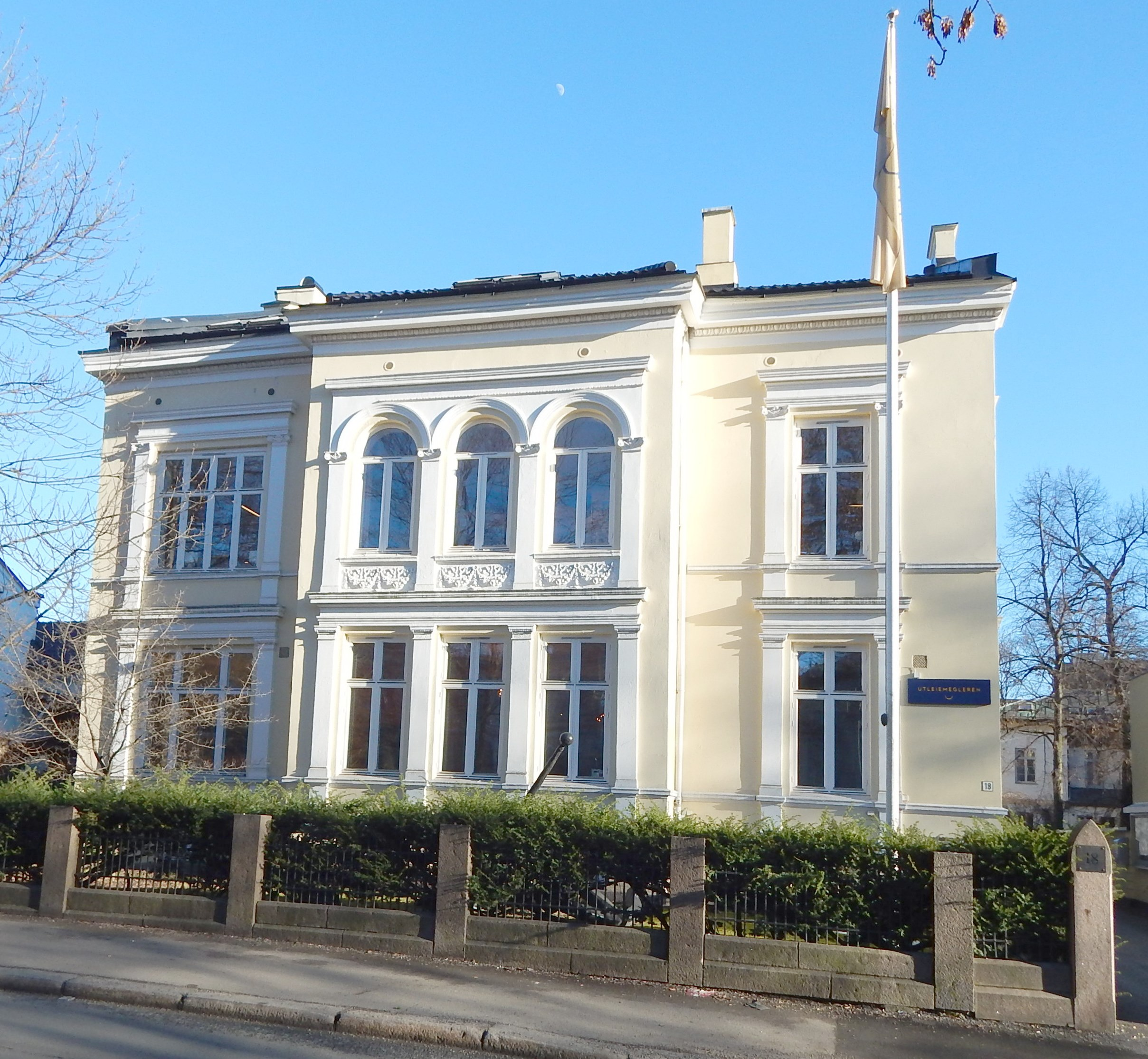 Josefines gate 18. Arkitekt: Waldemar F. Lühr (1878).